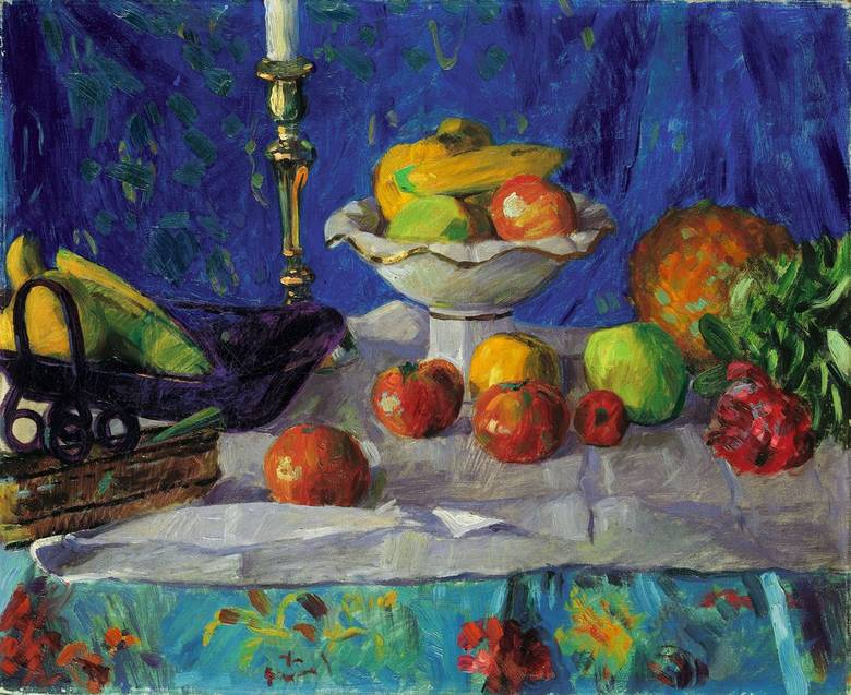 Stilleben mit Leuchter und Ananas